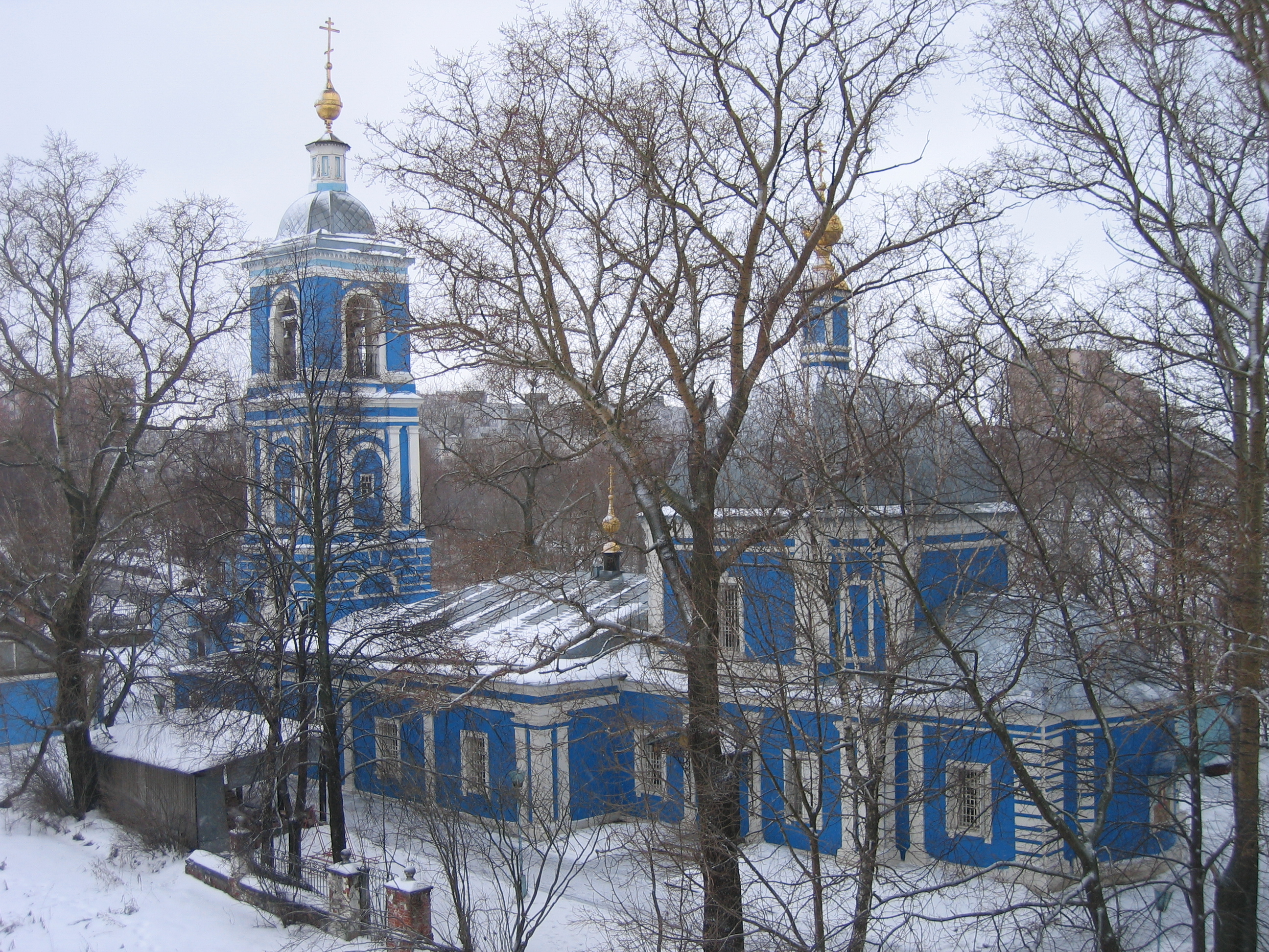 Kirche St. Johannes Chrysostomos in Woskressensk